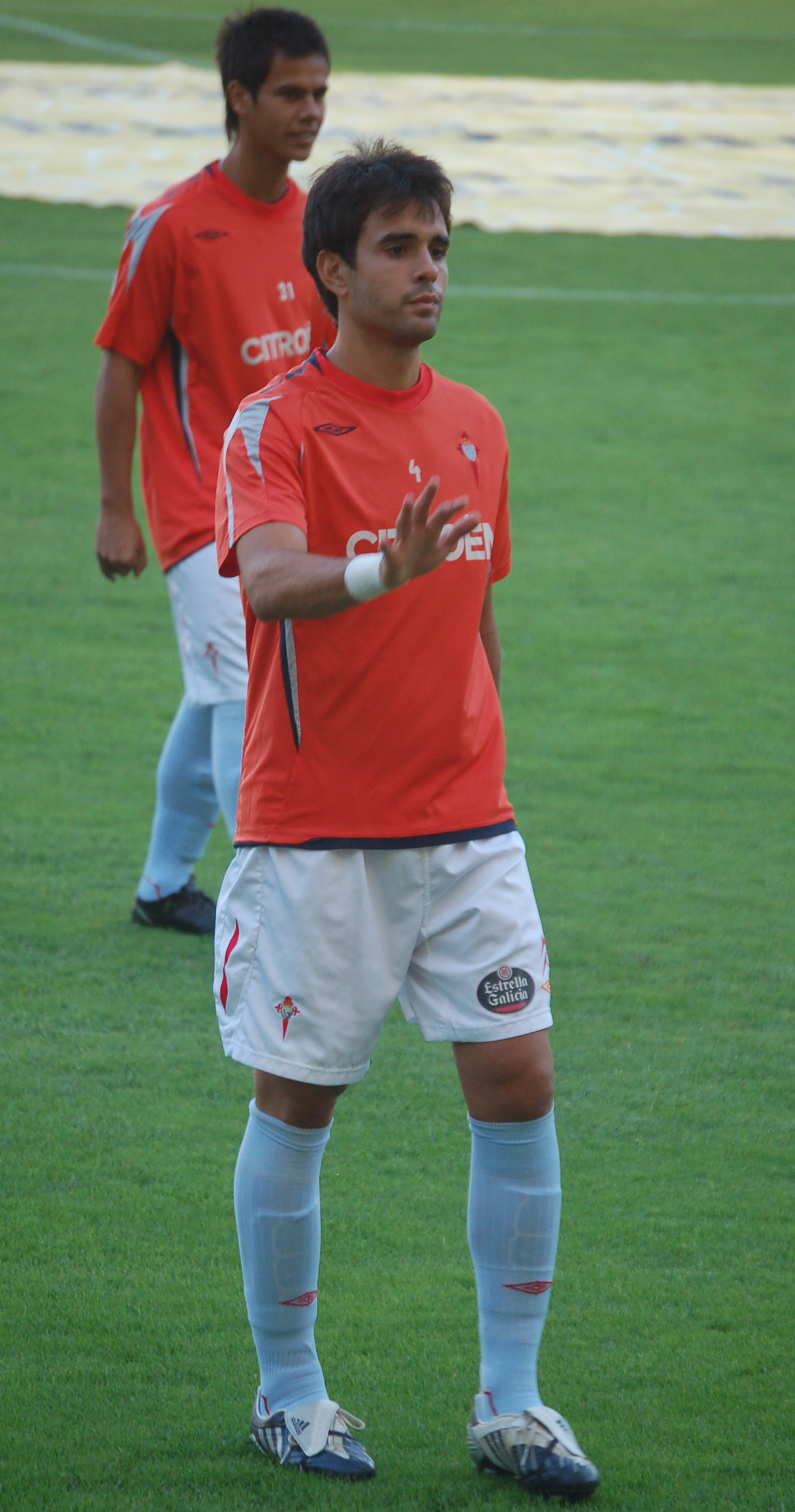 Borja Oubiña nos exercicios de quecemento previos ao Trofeo Cidade de Pontevedra 2009